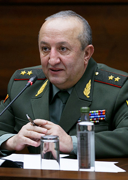 Начальник Генерального штаба Вооруженных сил Республики Армения генерал-лейтенант Мавсес Акопян